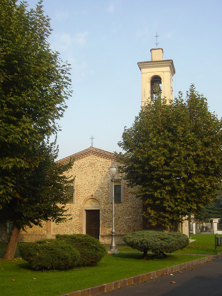 Cogliate 10/2005